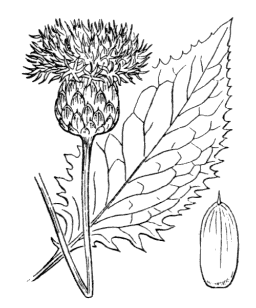 Klasea lycopifolia